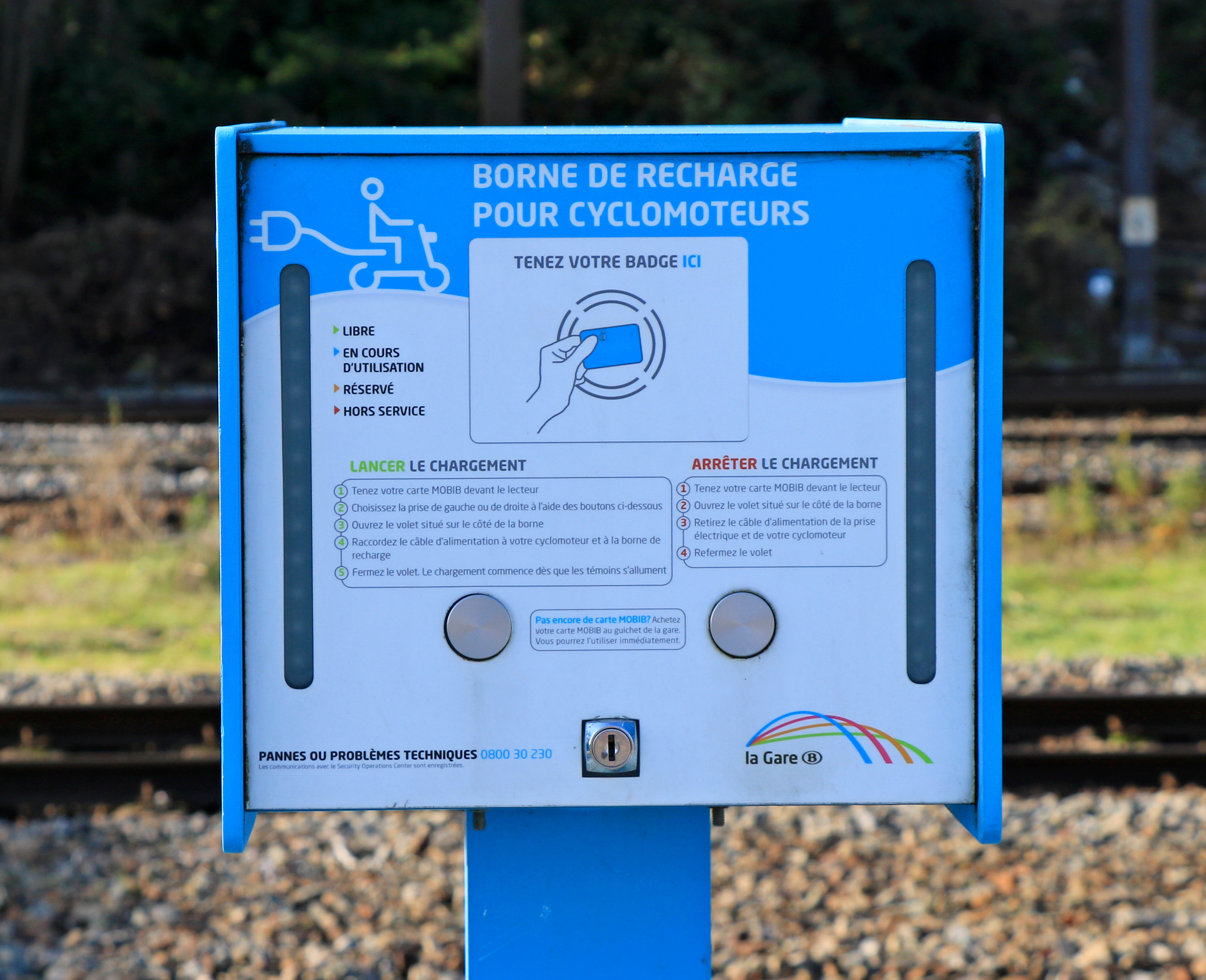 Belgique - Gare d'Ottignies - borne de recharge pour cyclomoteurs électriques